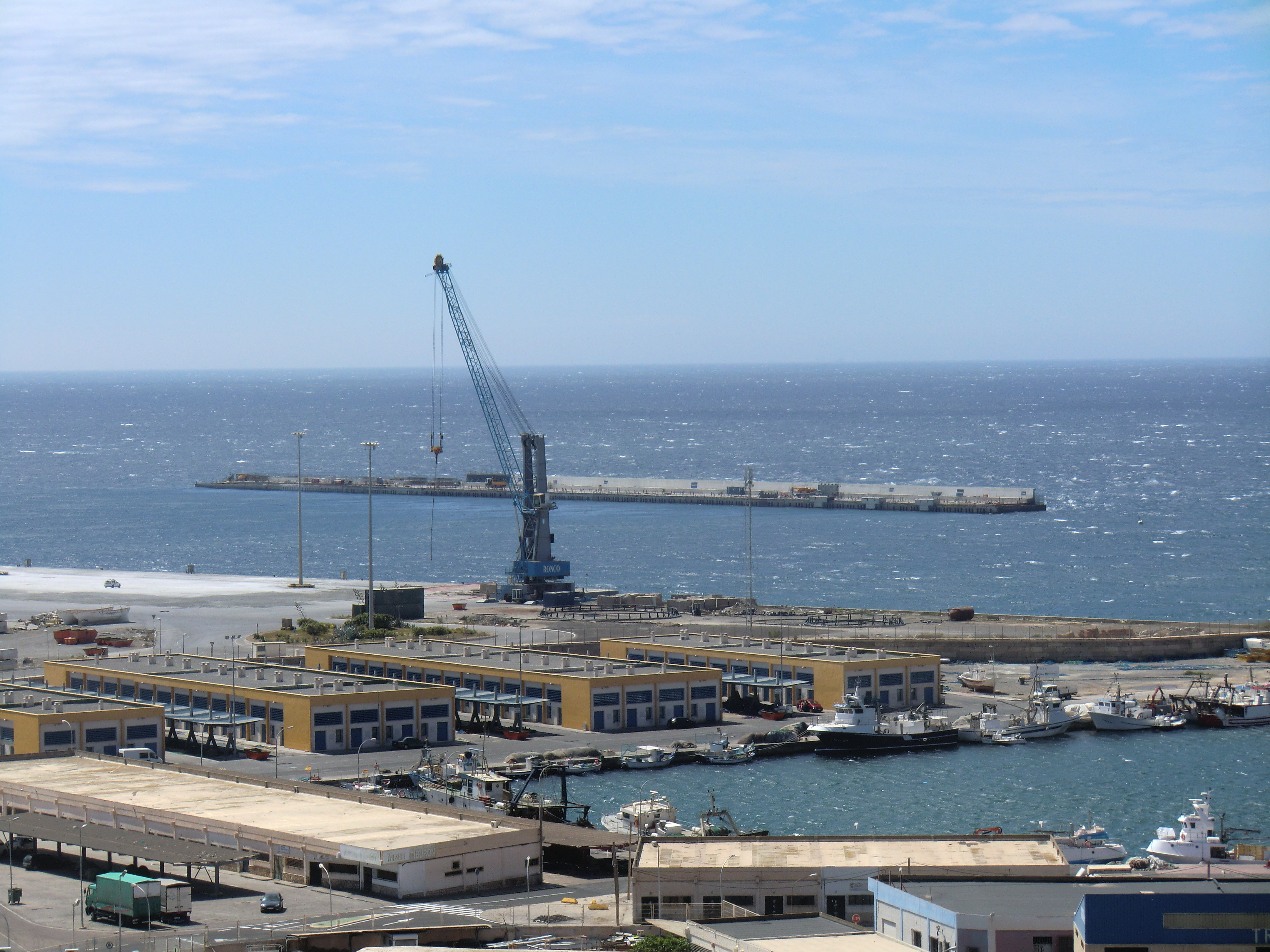 Foto en La Chanca